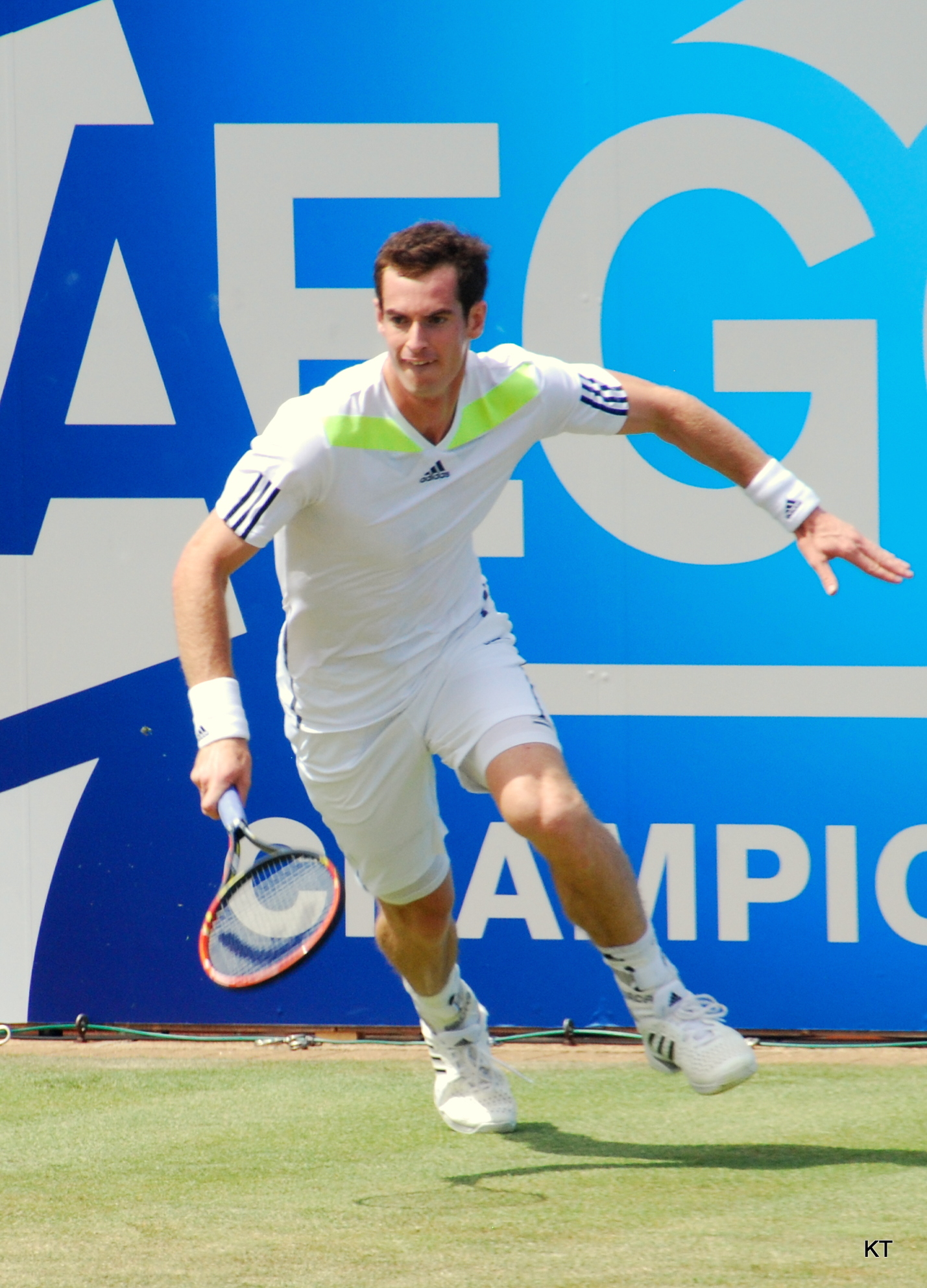 Andy Murray